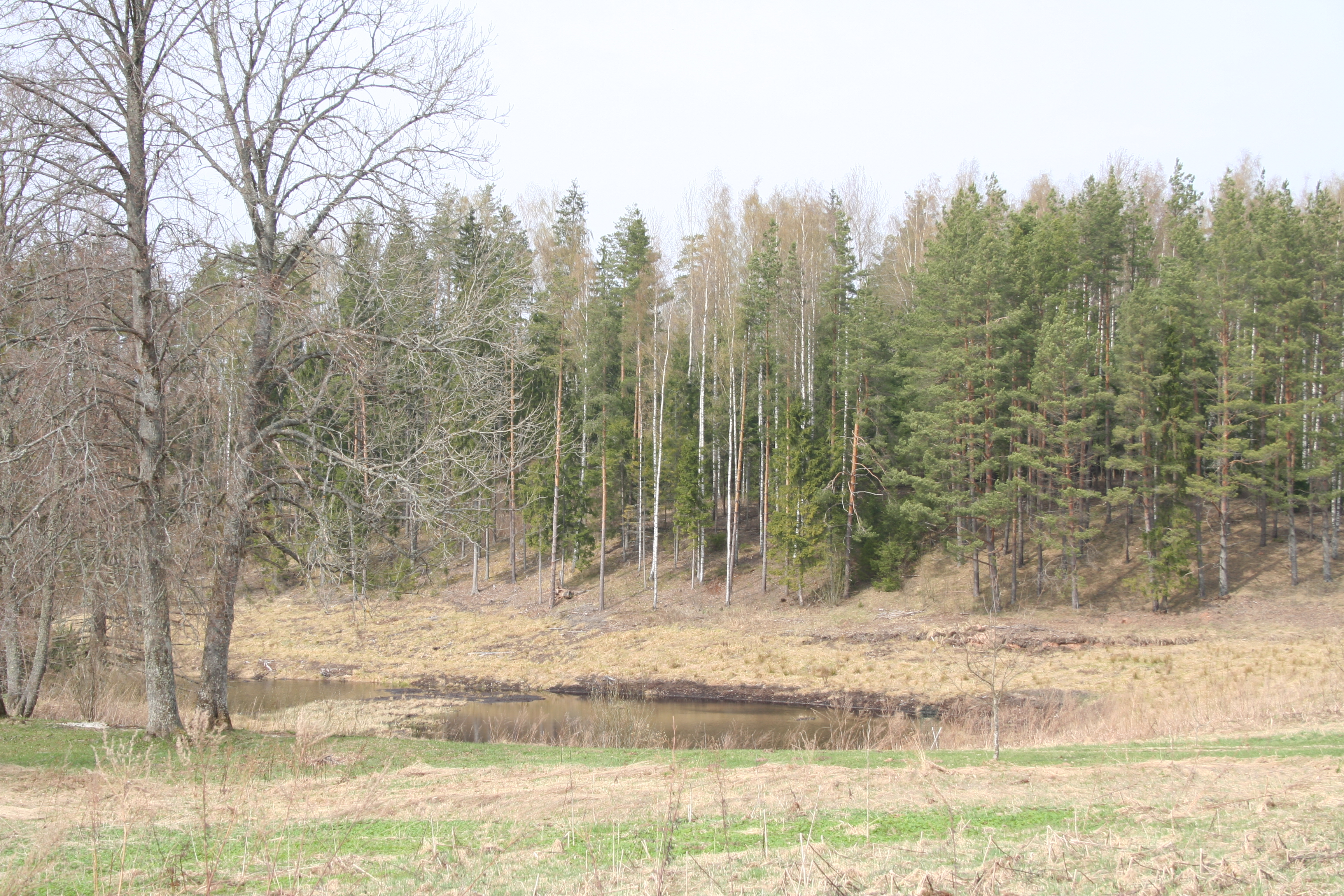 Voorepalu, (Intsupalu) Palu talu tiik